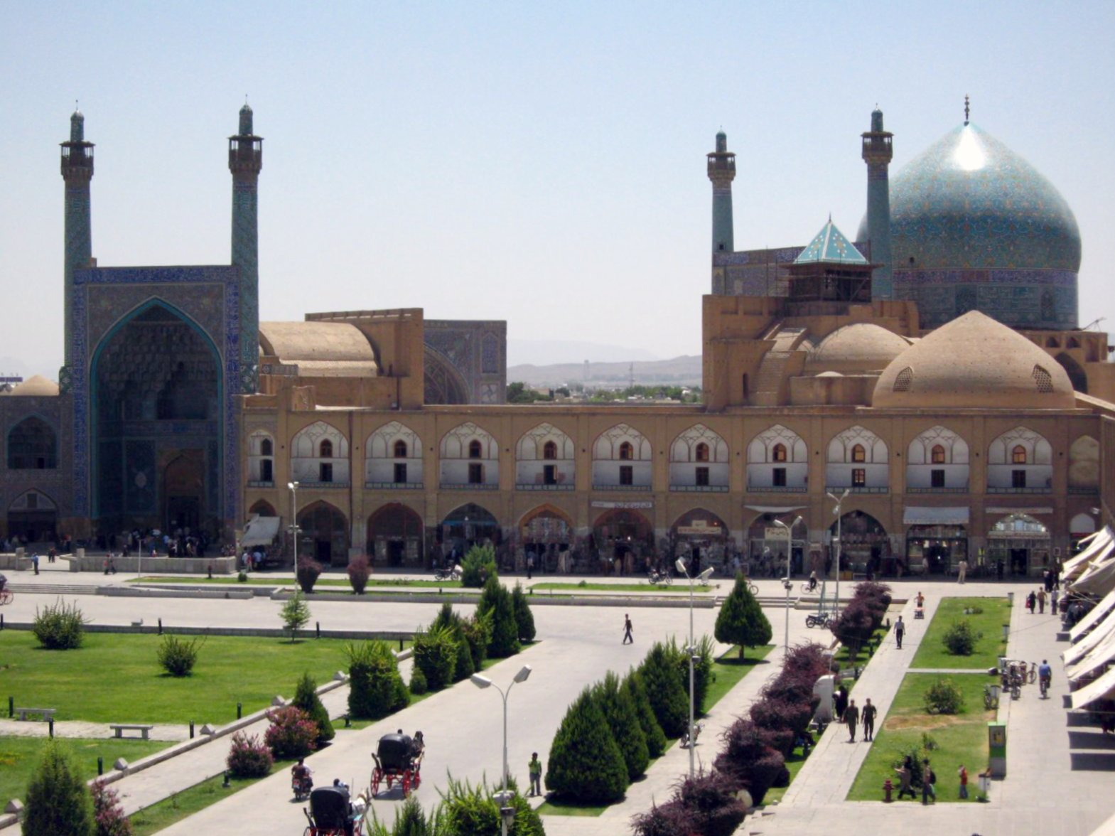 Masjed-e Imam (Imam Mosque), Isfahan, Iran